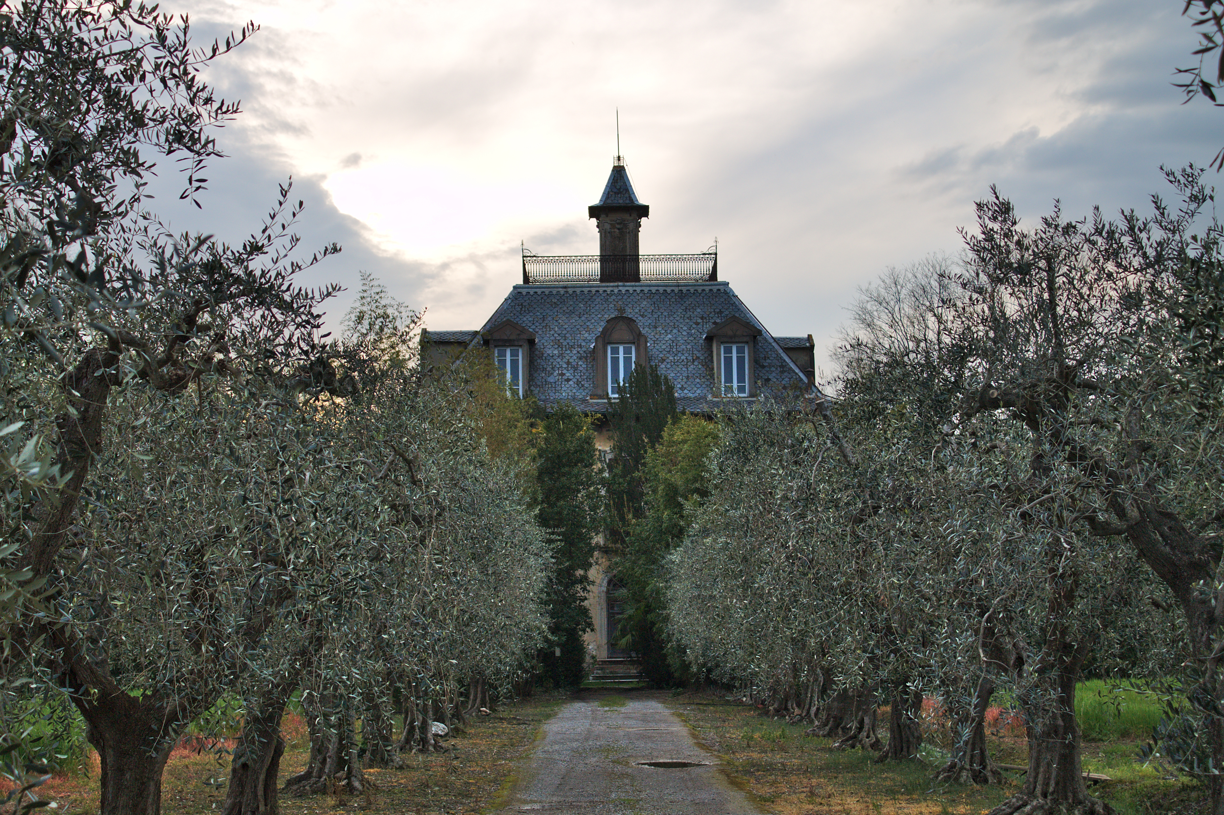 Villa Isnard in Cascina (PI)